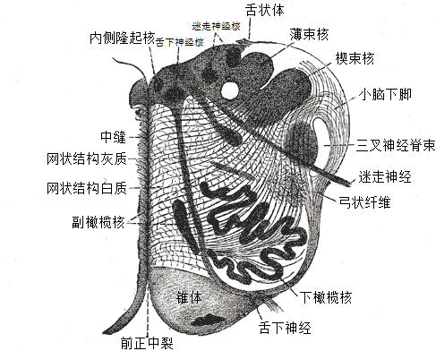 人脑延髓详图